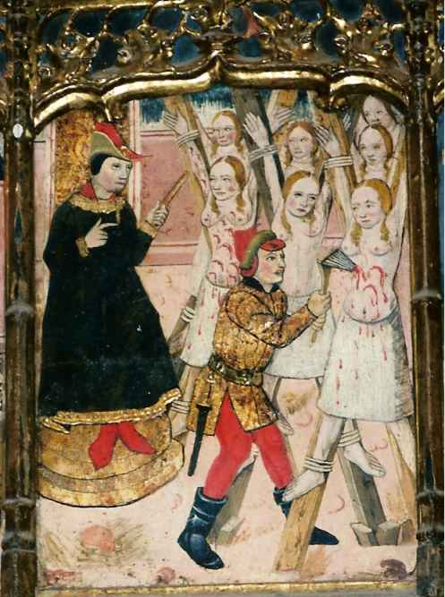 Martirio de las siete mujeres que recogieron sangre de san Blas, retablo de San Blas, iglesia de San Salvador de Luesia (Zaragoza).